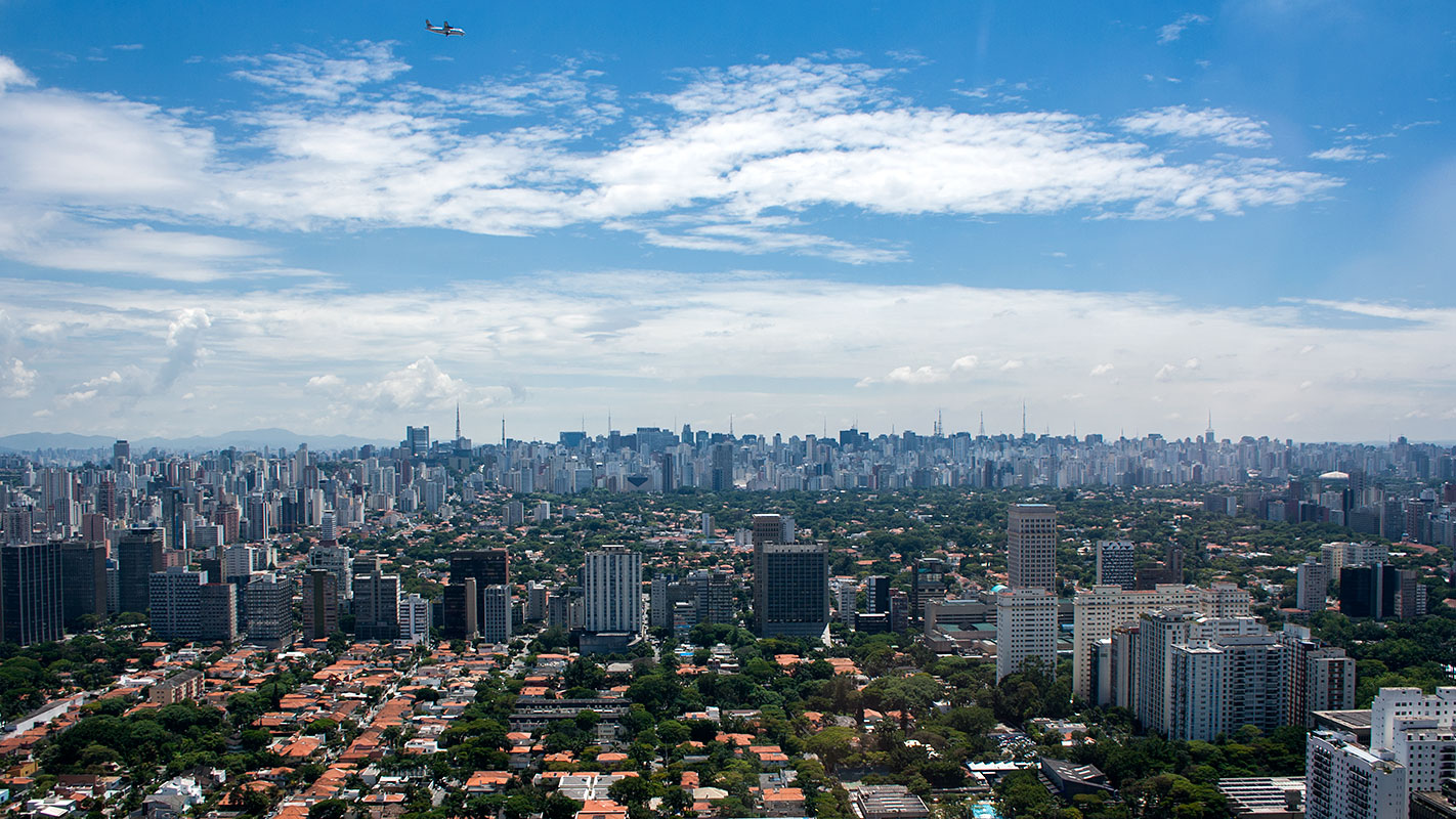 BAIRROS DOS JARDINS